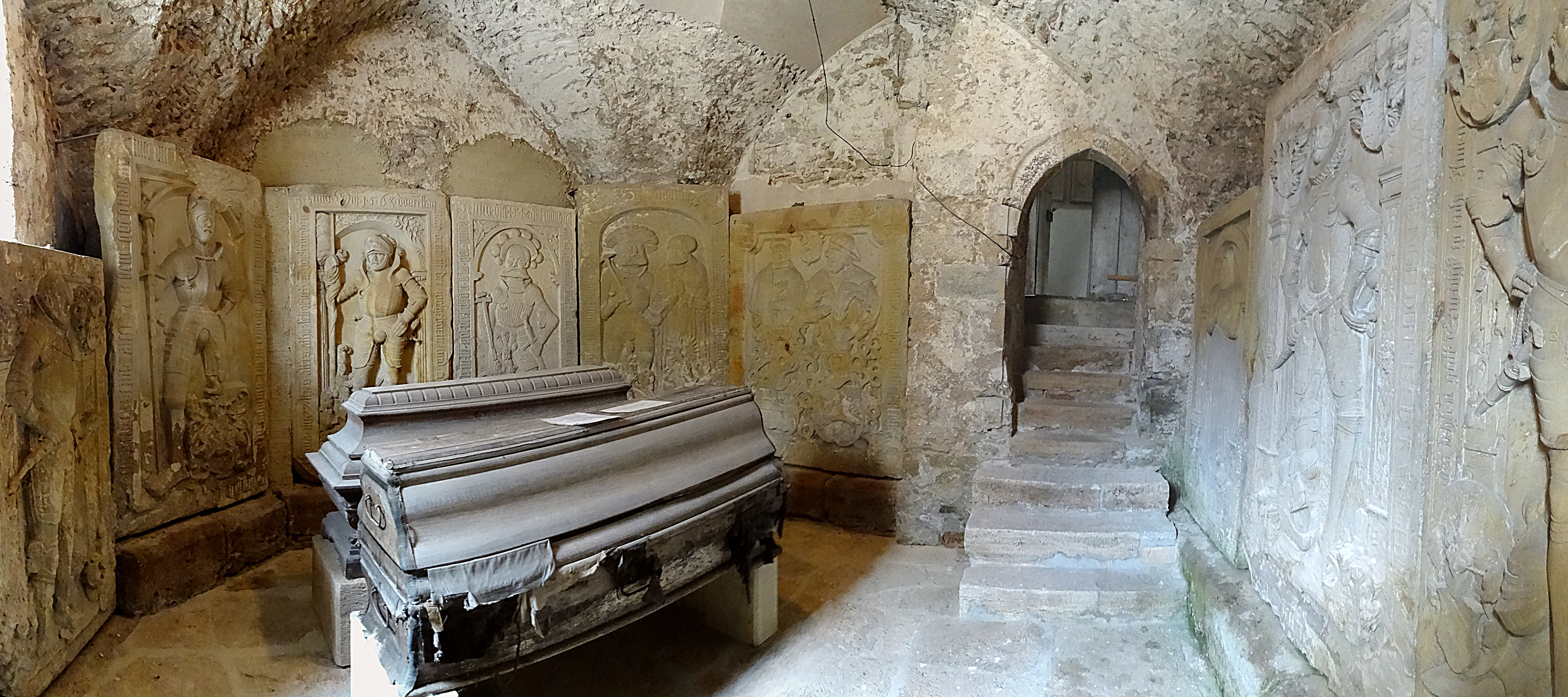 Gruft unter dem Turm mit Grabplatten und Ahnengalerie der Grafen von Gleichen und Tonna von 1525 in der Pfarrkirche St. Peter und Paul (Gräfentonna)